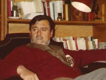 Recorte de un plano medio de Jose Antonio Garcia-Blanco Peinador en su casa en 1990.